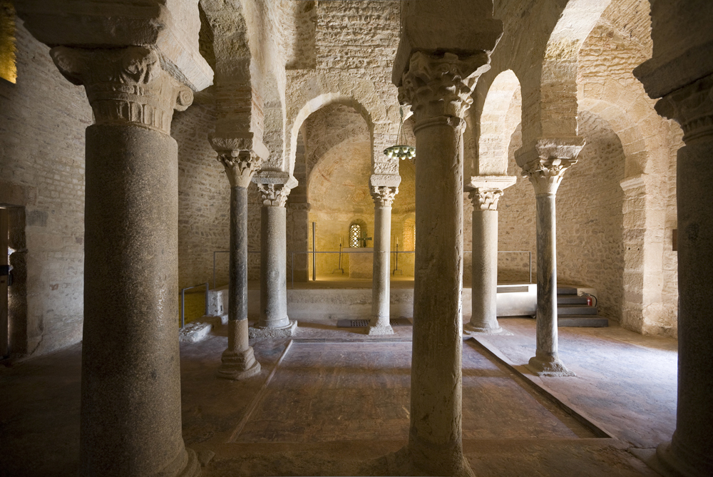 Cultural Heritage Spain